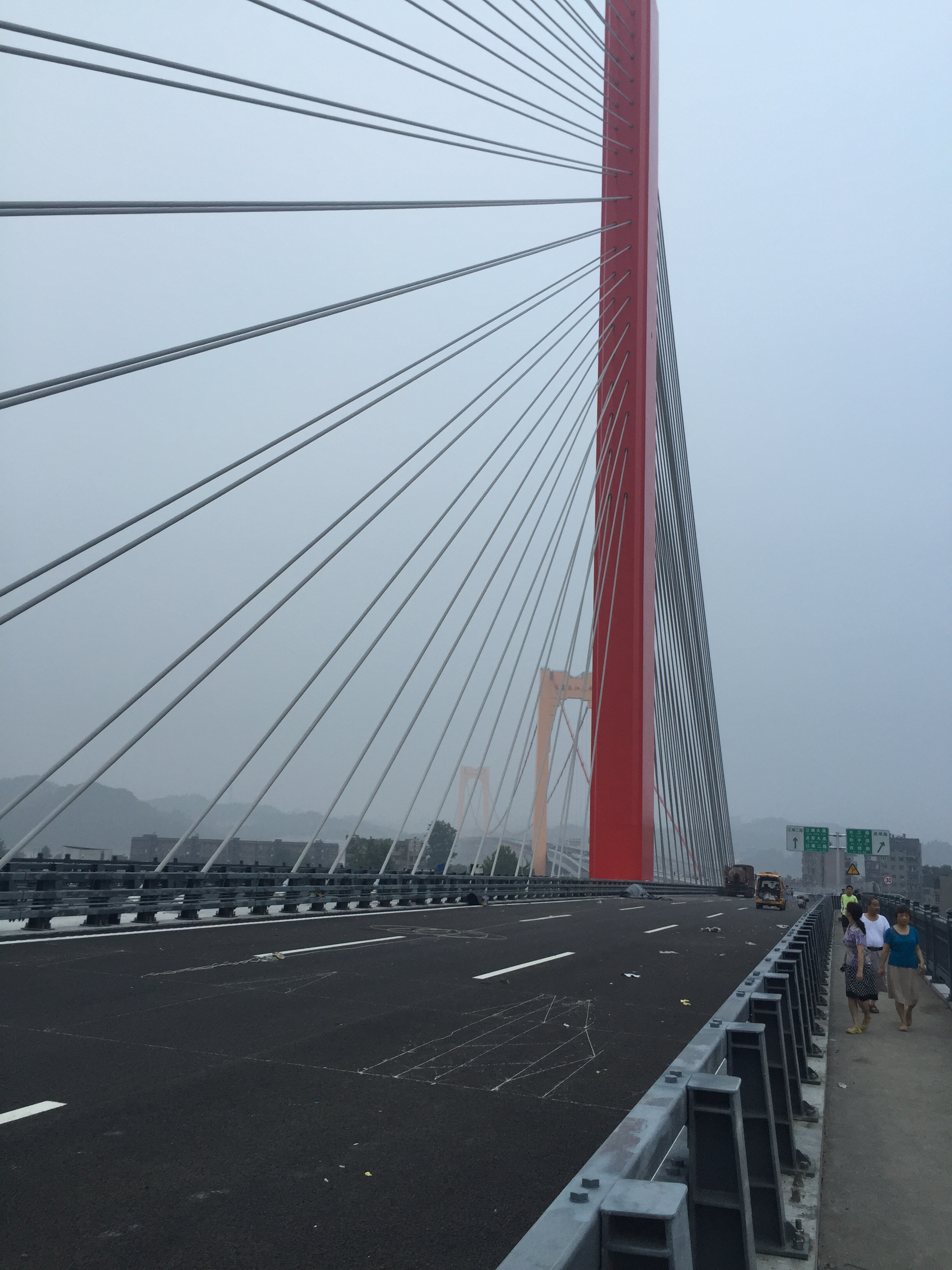 中文（中国大陆）: 宜昌至喜长江大桥